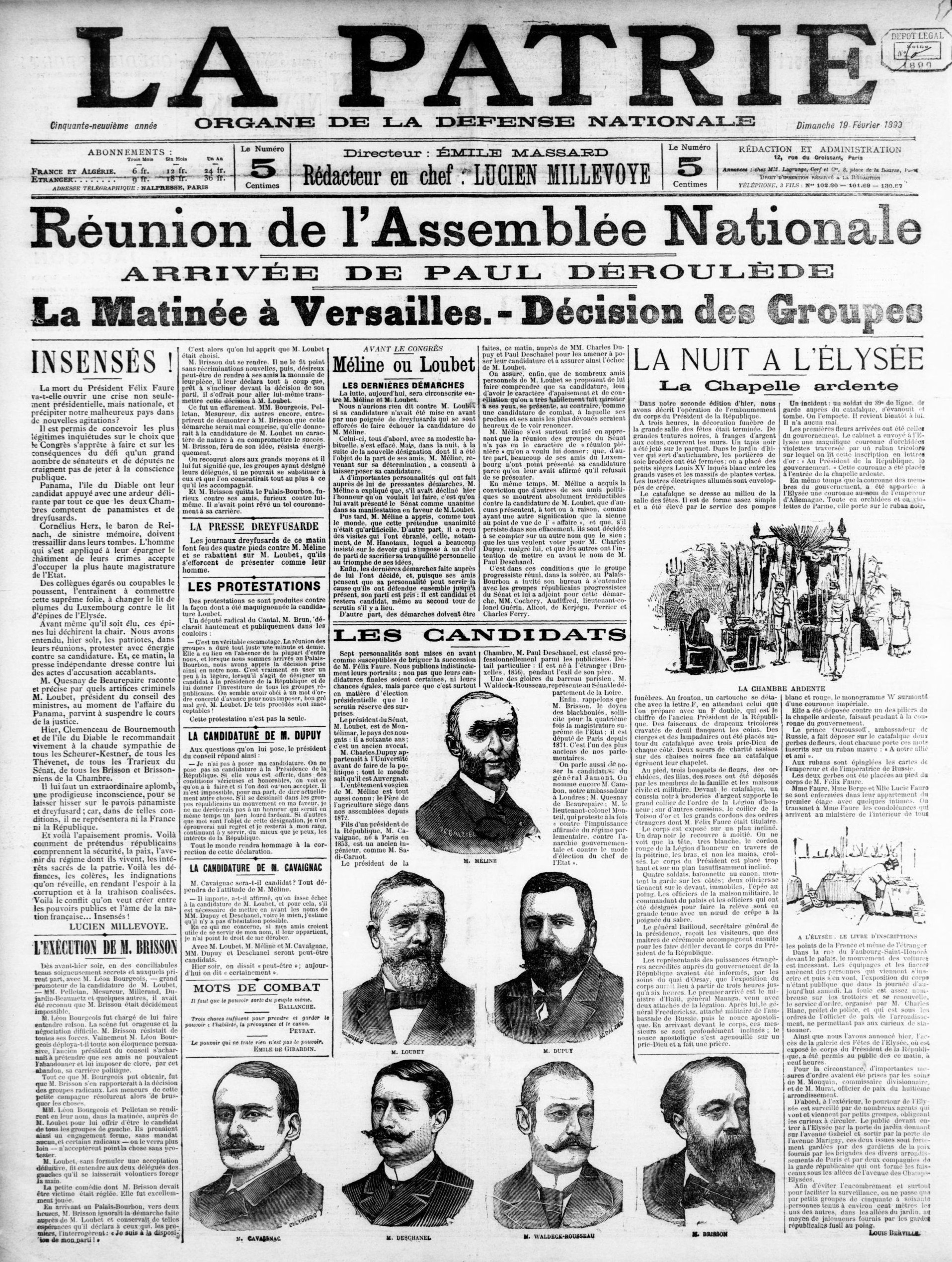 Une de La Patrie du 19 février 1899.